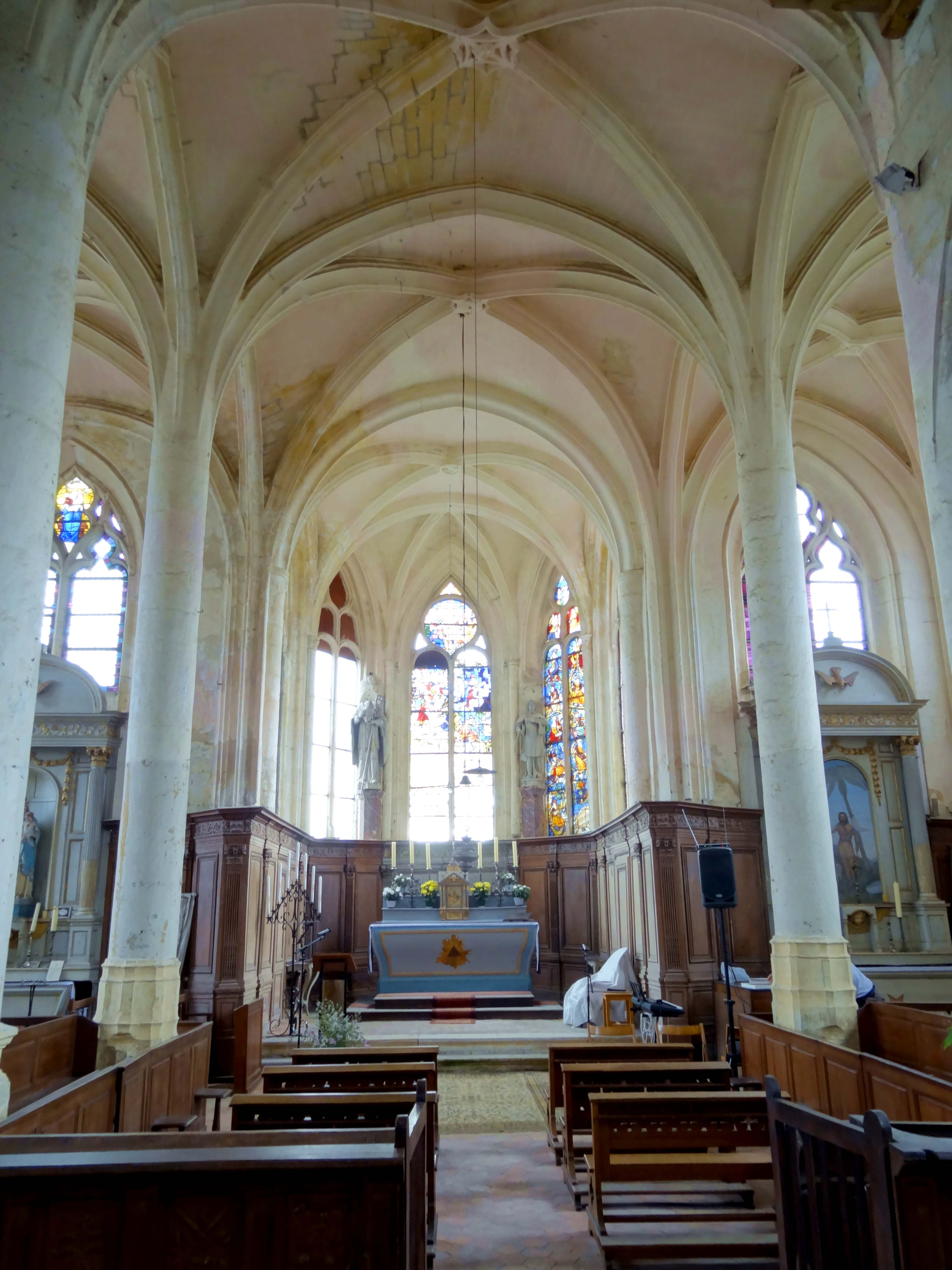 Intérieur de l'église - voir titre.